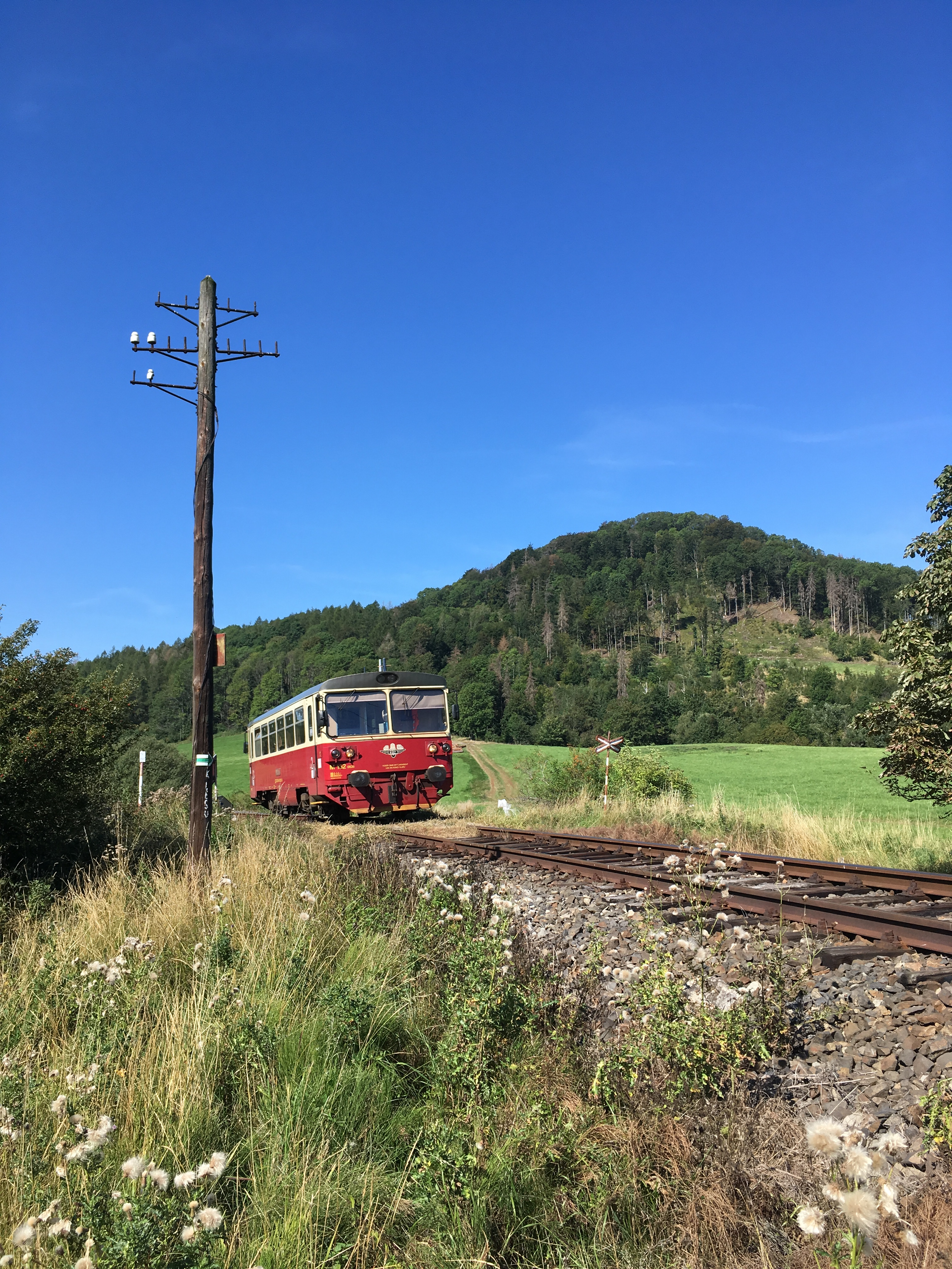 Motorový vůz M 152.0535 jako vlak 2402 linky T1 pod Zámeckým vrchem dne 4. září 2019.